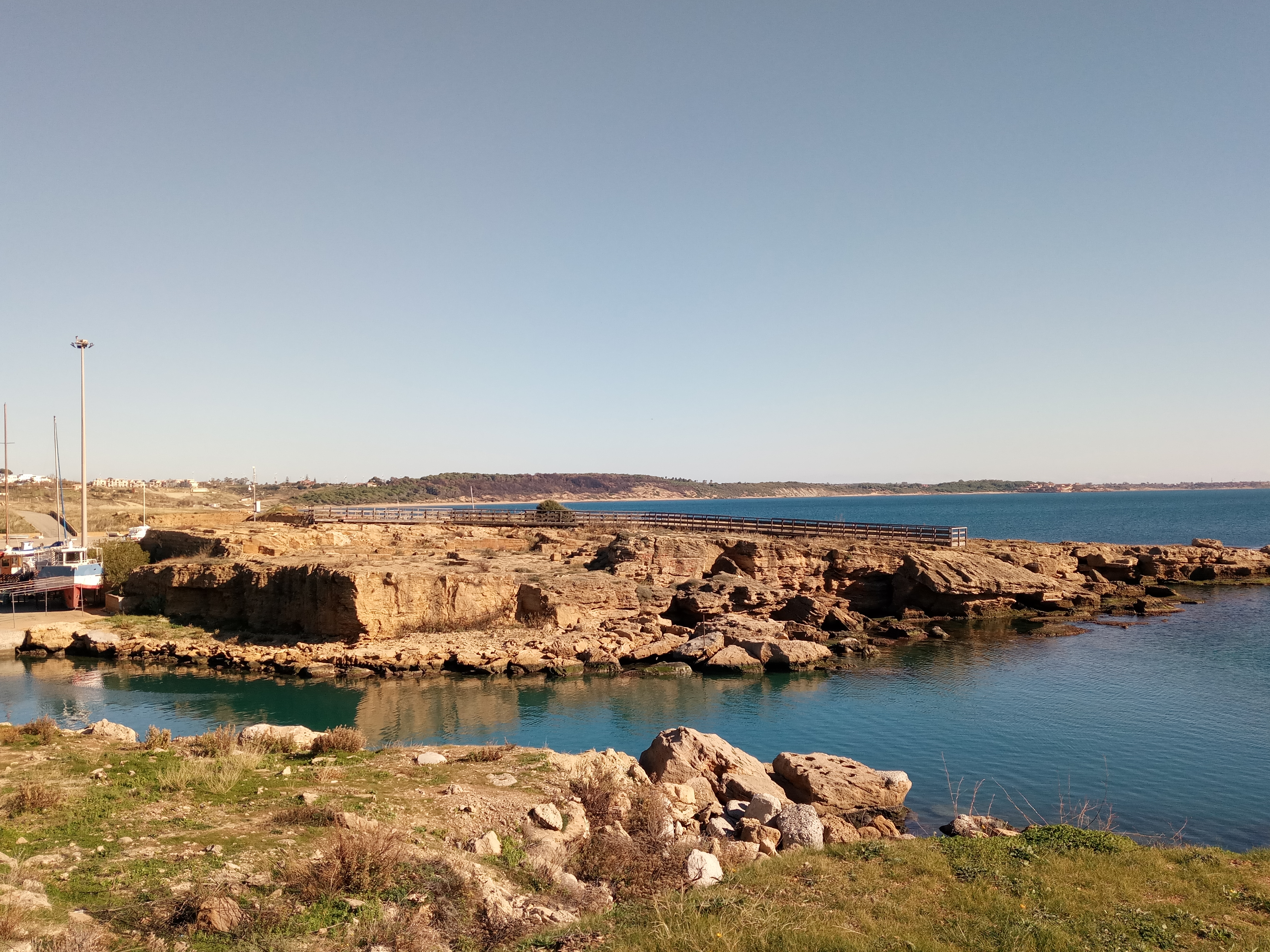 La maggior parte dei resti di estrazione mineraria è situata sulla scoglio fotografato su cui sono state messe delle pedane per visitarle , altre sparse stanno lungo tutta la scogliera castellese.